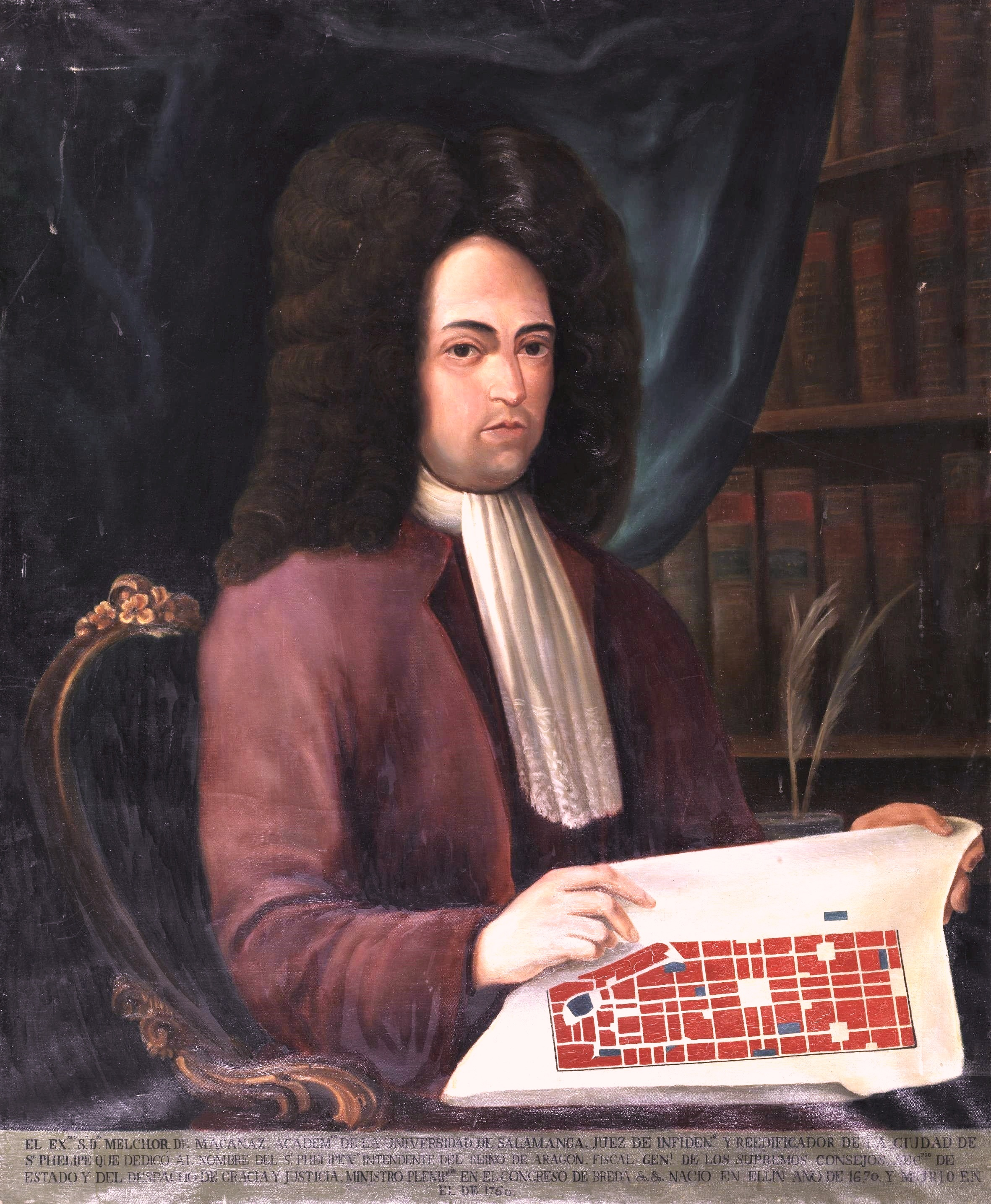 Retrato del ilustrado y politico español Melchor Rafael de Macanaz (1670-1760).